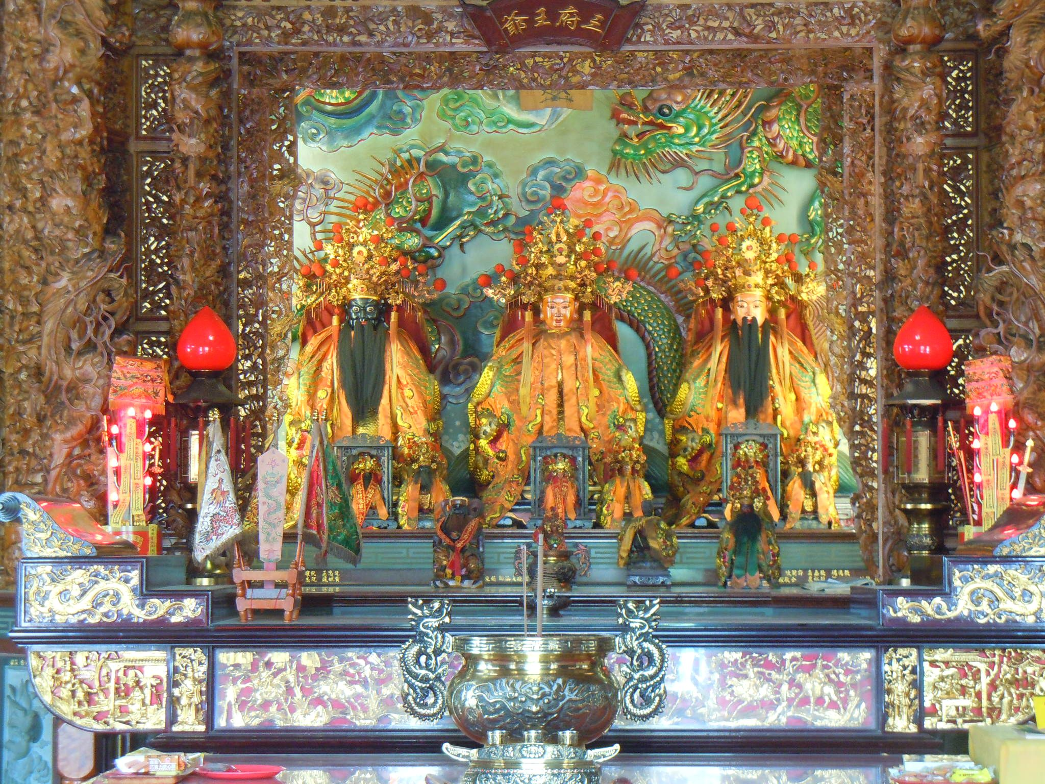 水景福隆宮位在臺中市北屯區水景里景賢街30號。